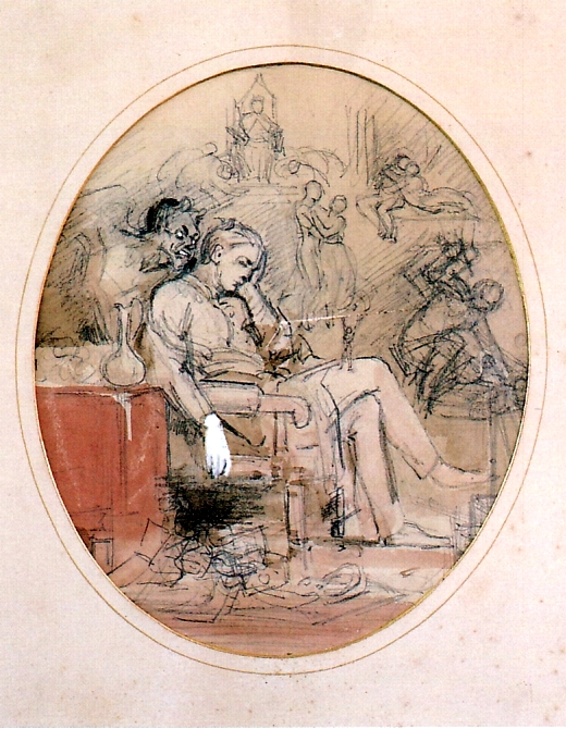 Self-portrait